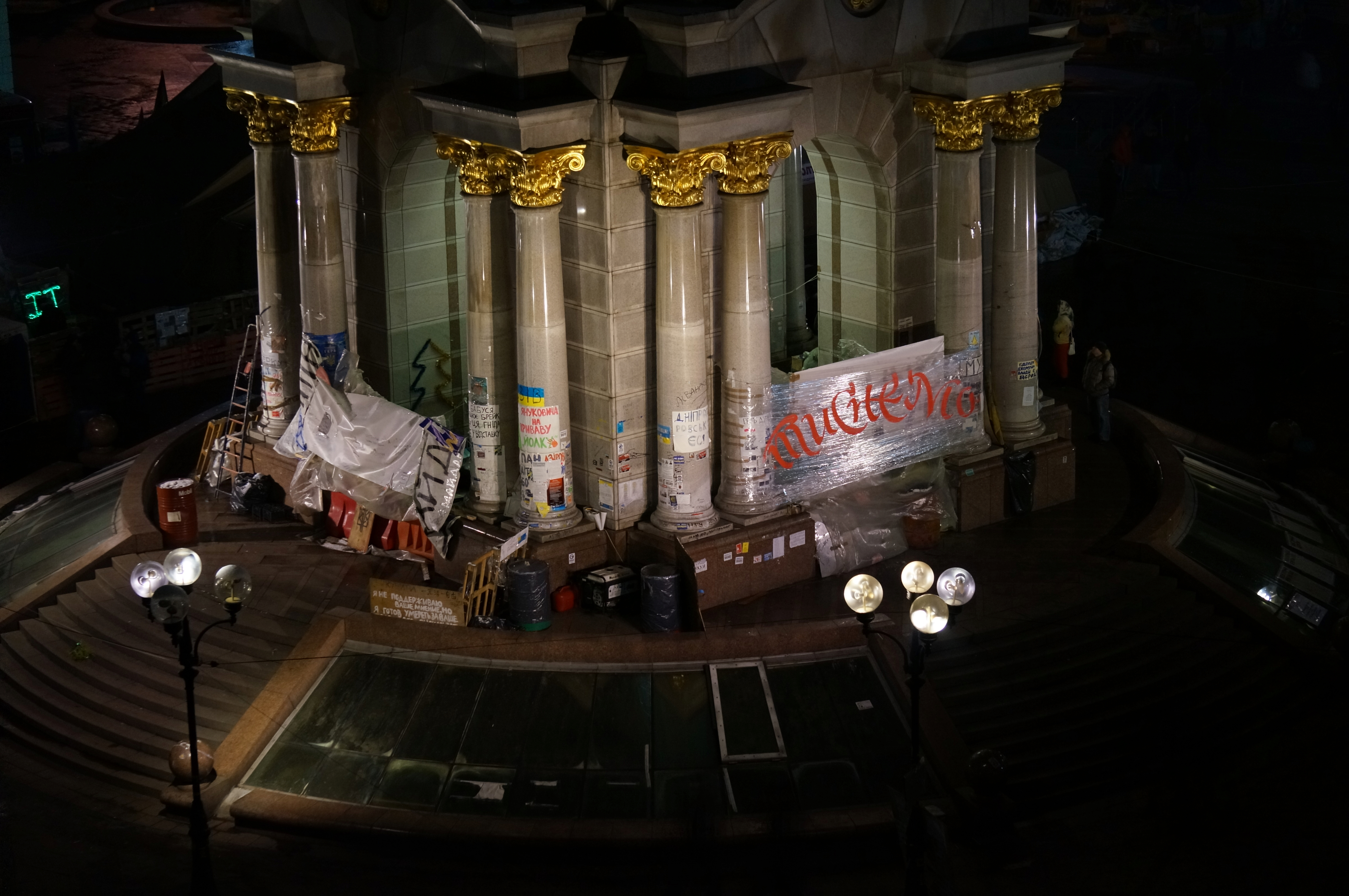 Euromaidan in Kiev